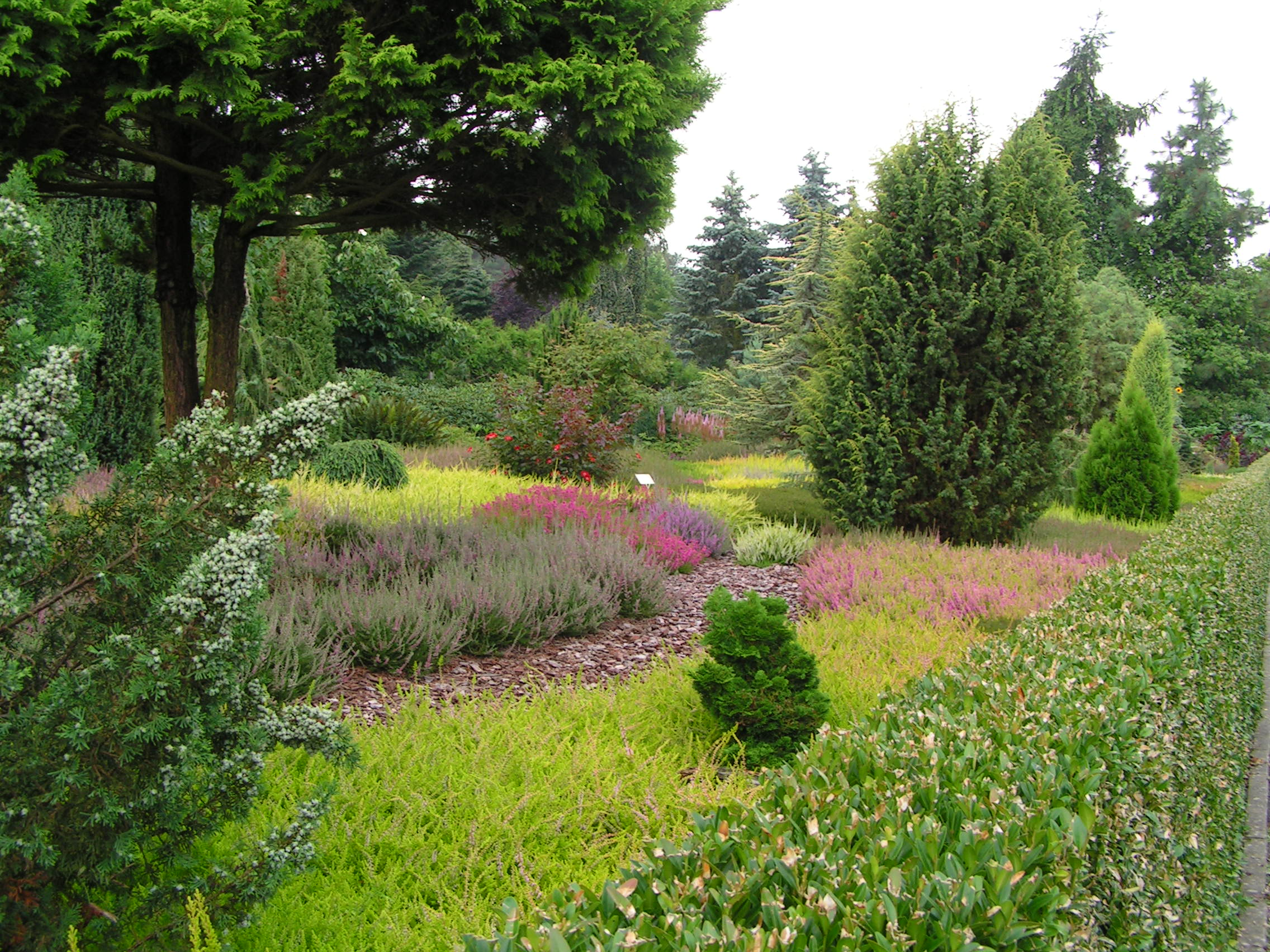 Botanischer Garten Christiansberg, Gemeinde Luckow, Landkreis Uecker-Randow (Vorpommern).